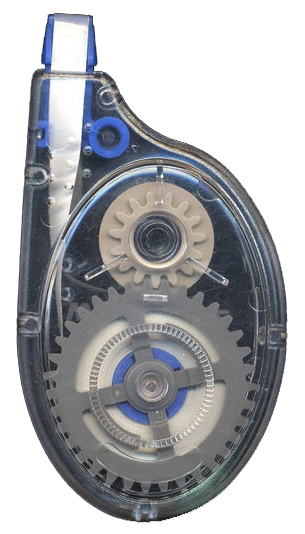 correction tape dispenser